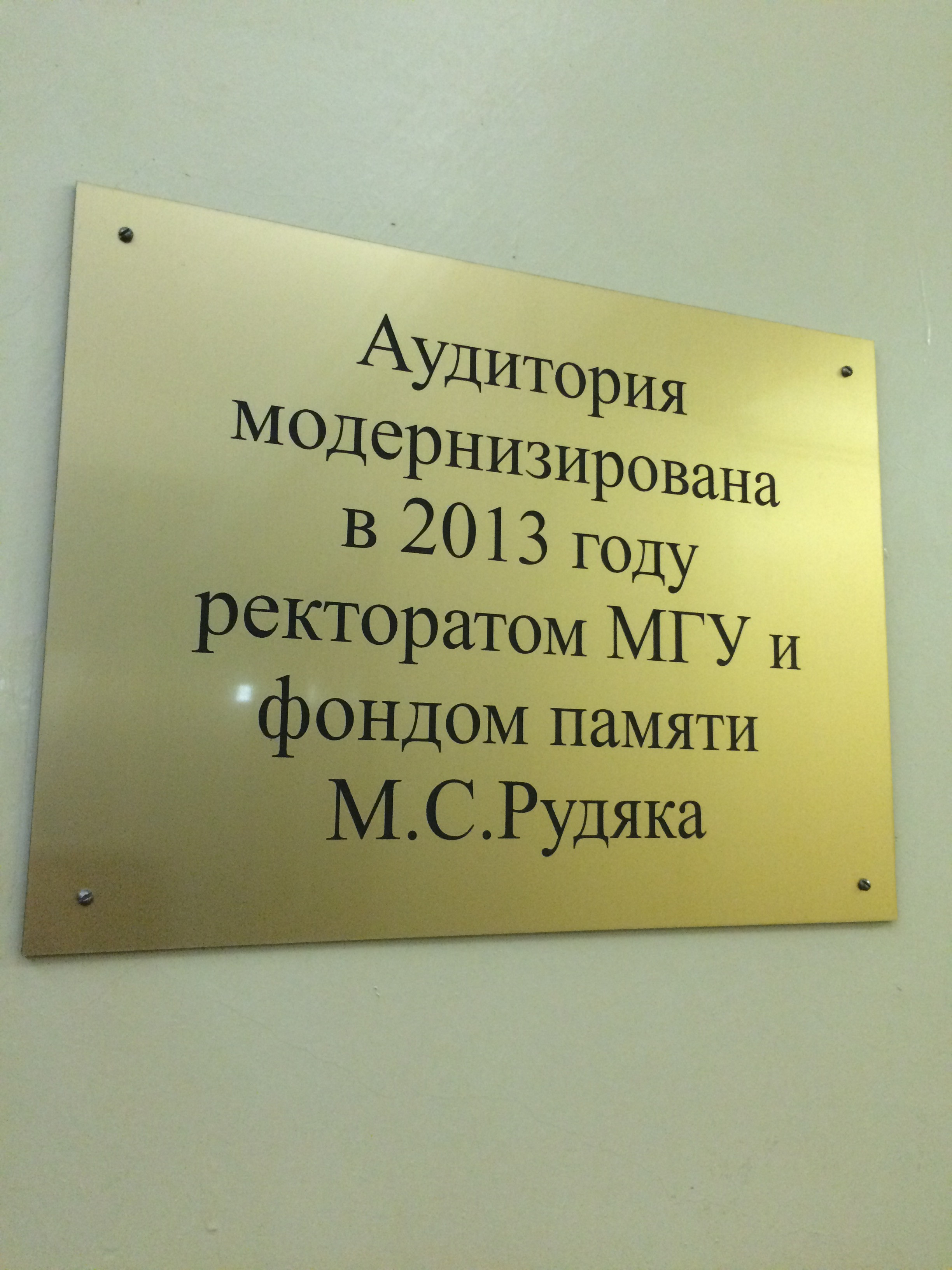 Табличка на кабинете Геологического факультета МГУ